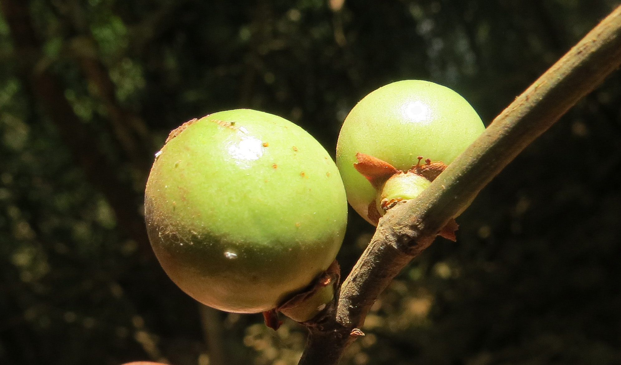 Vinayaraj V R photos